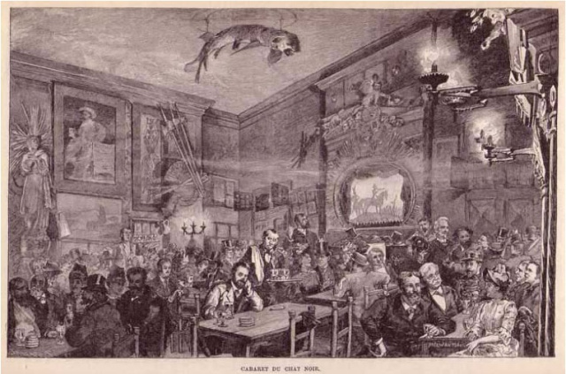 Primer pis de le Chat Noir del carrer Victor Massé, on es projectava el famós teatre d'ombres.